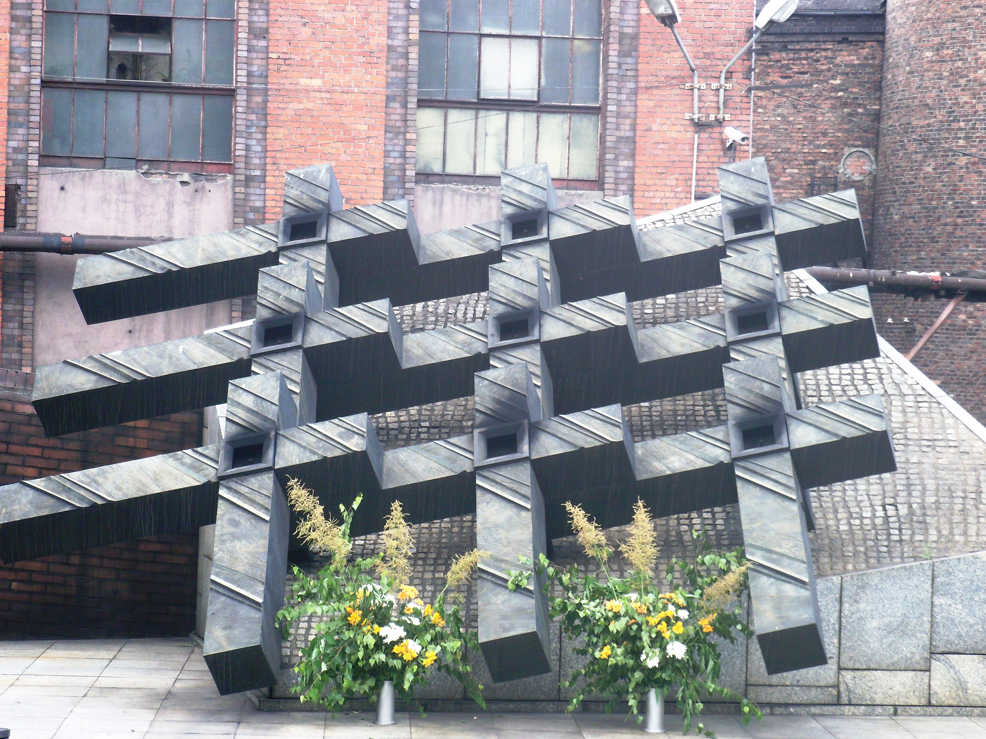 Pomnik poległych górników KWK „Wujek” w Katowicach